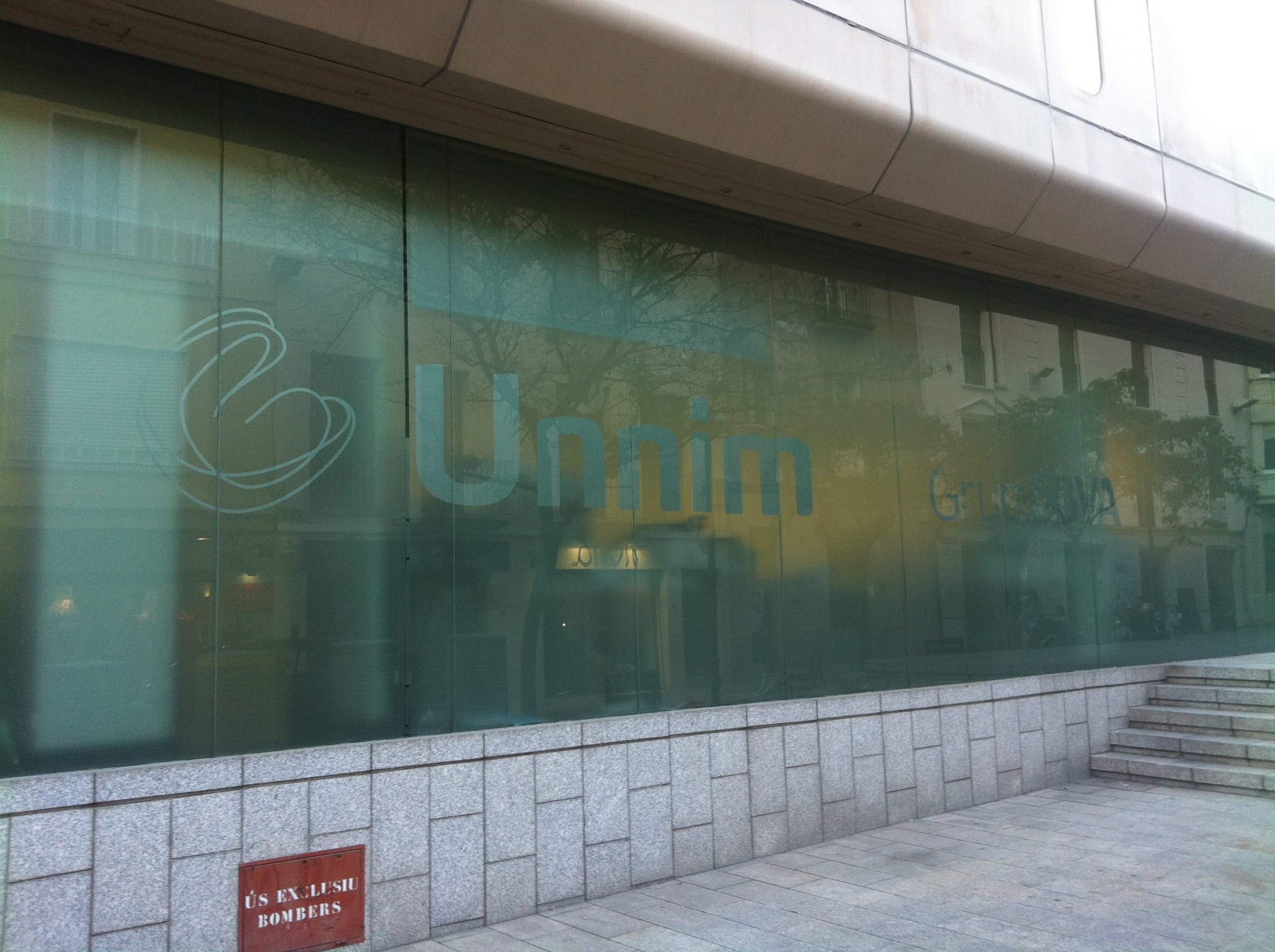 Cap de setmana d'integració de la marca Unnim al grup BBVA. Operaris esborrant logos a la seu central de Sabadell